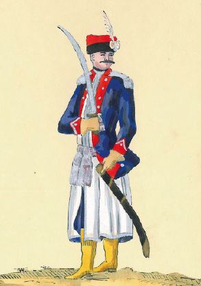 Generał Biszewski komendant 1 Pułku Straży Przedniej [oficer pułku przedniej staży Byszewskiego- późniejszego 4 pułku przedniej staży)]